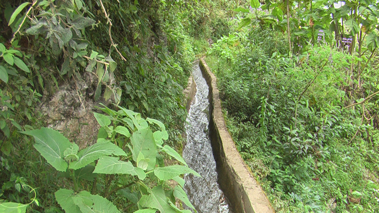 Uno de los Principales Canales de Agua que abastece a Cadmalca para el regadío de los cultivos Agricolas